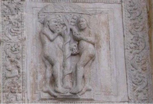 Partie du portail de la Cathédrale romane de Vérone : Le péché originel